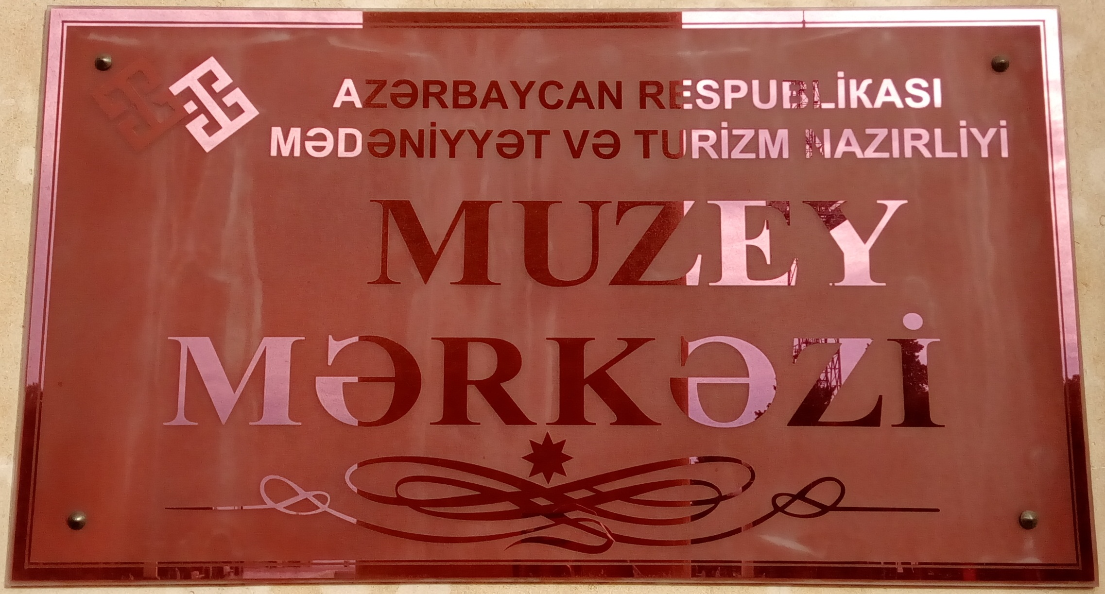 Muzey Mərkəzi